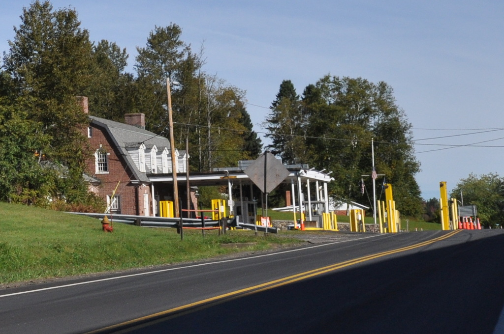 Border station, Beecher Falls, Vermont.